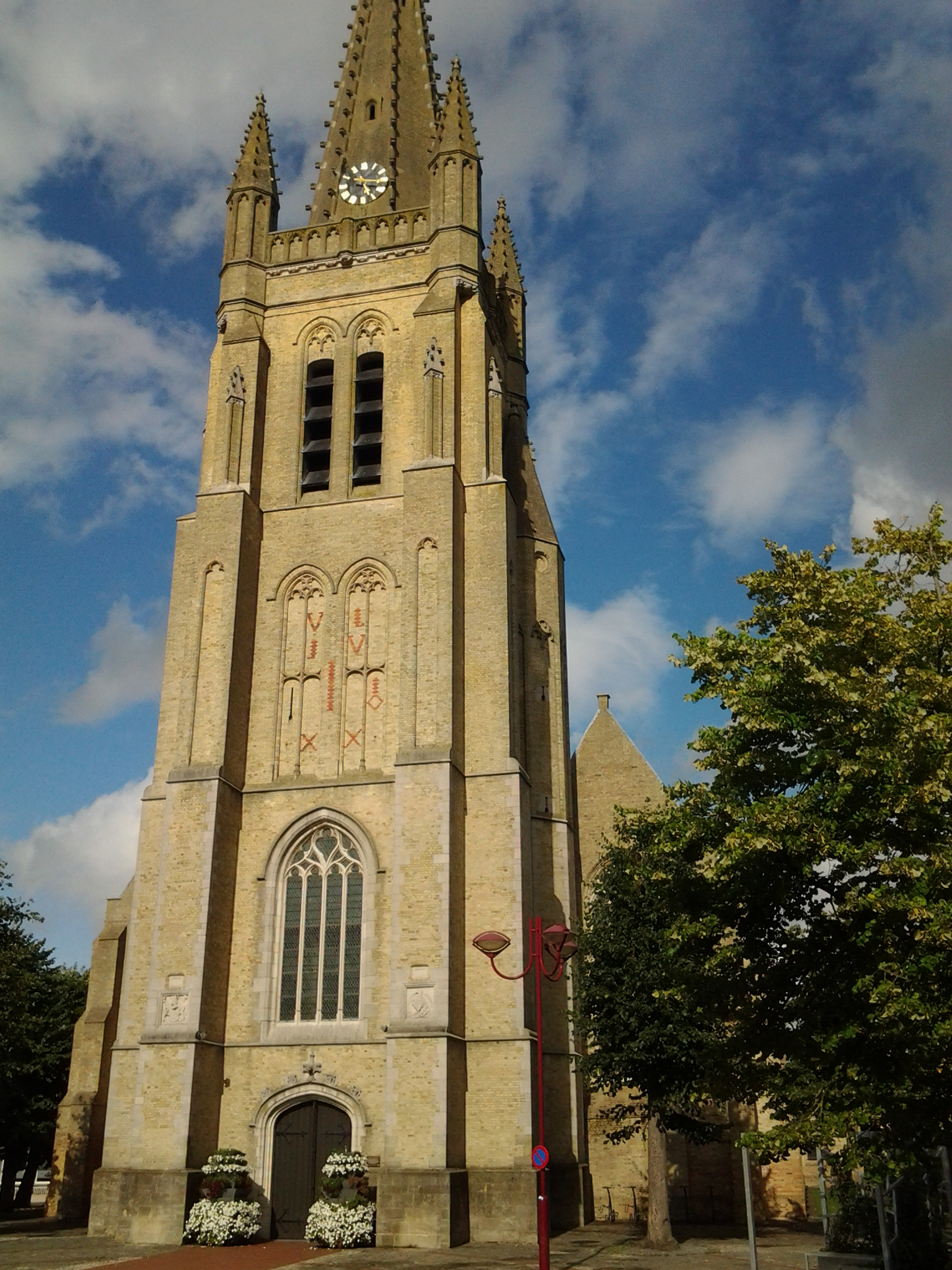 Parochiekerk Sint-Petrus en Paulus Kerkplein 52 Rumbeke